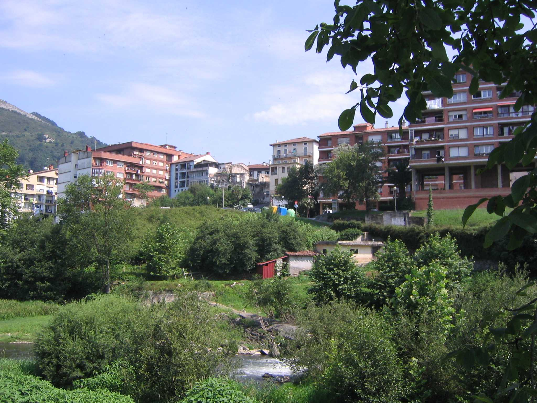 Cestona, Guipúzcoa, País Vaco, España.